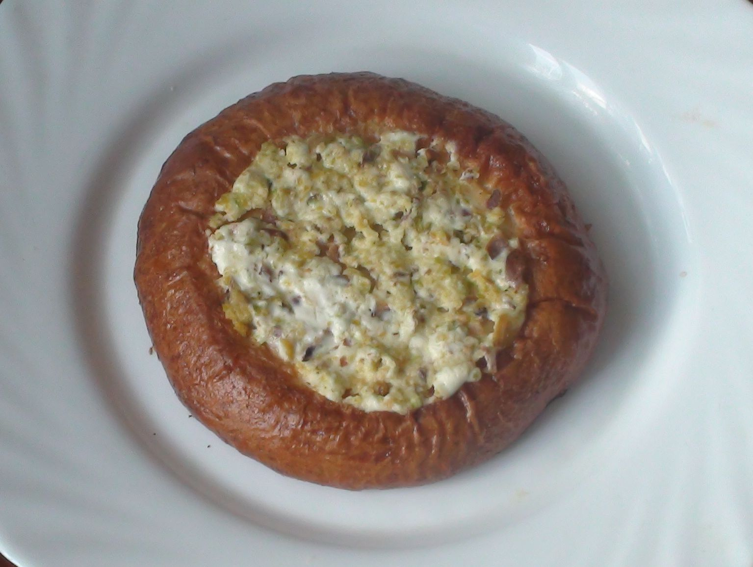 Башҡортса: Муйыл майы беремэсе